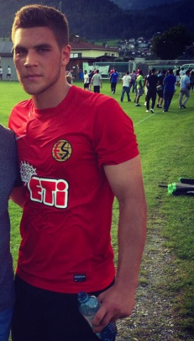 Andaç Güleryüz